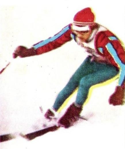 Jean-Claude Killy en 1967 - Campioni dello Sport 1967-1968, n°509